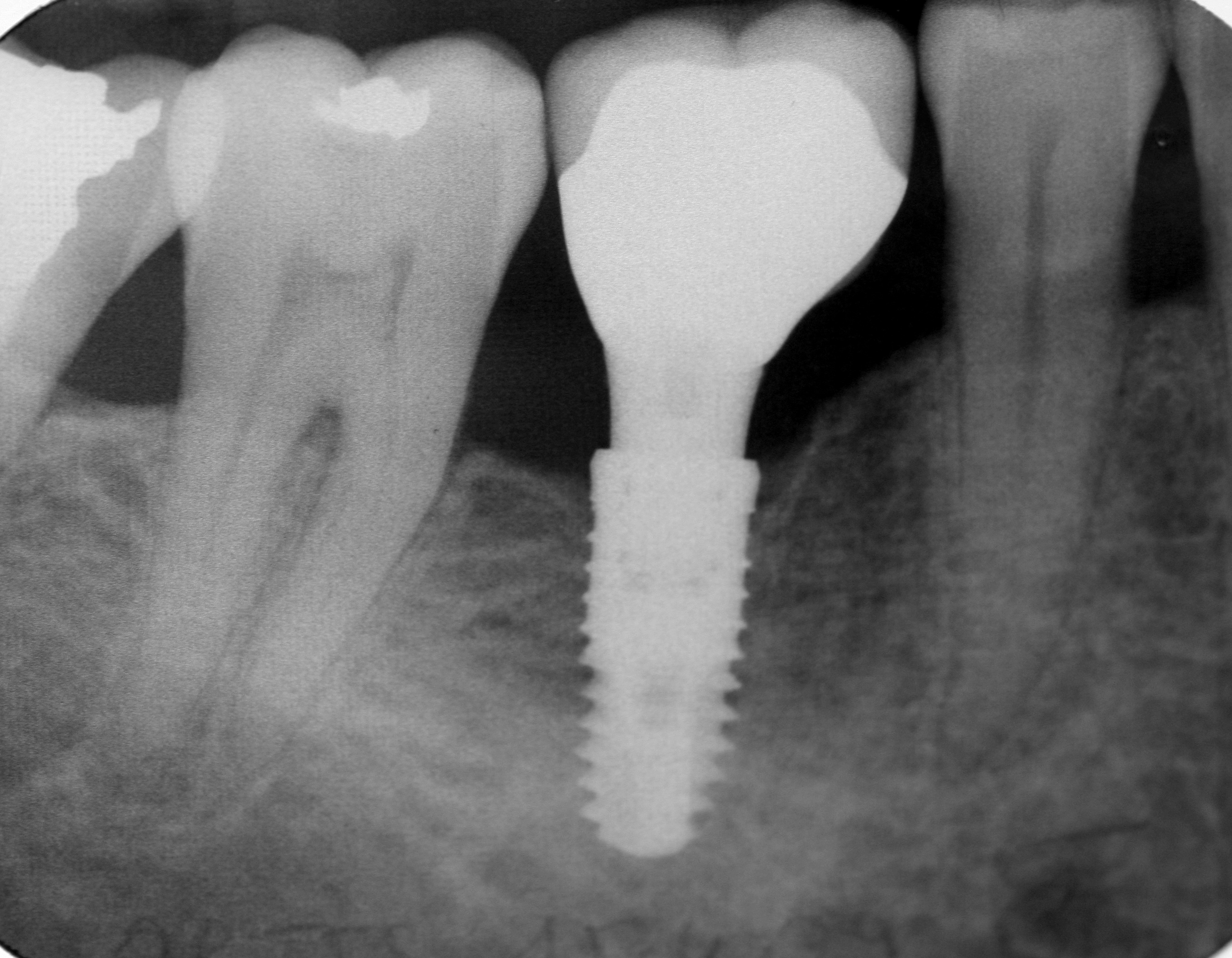 molaire sur implant